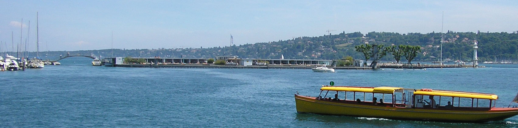 Les Bains des Pâquis à Genève (vus depuis le port CGN des Pâquis).